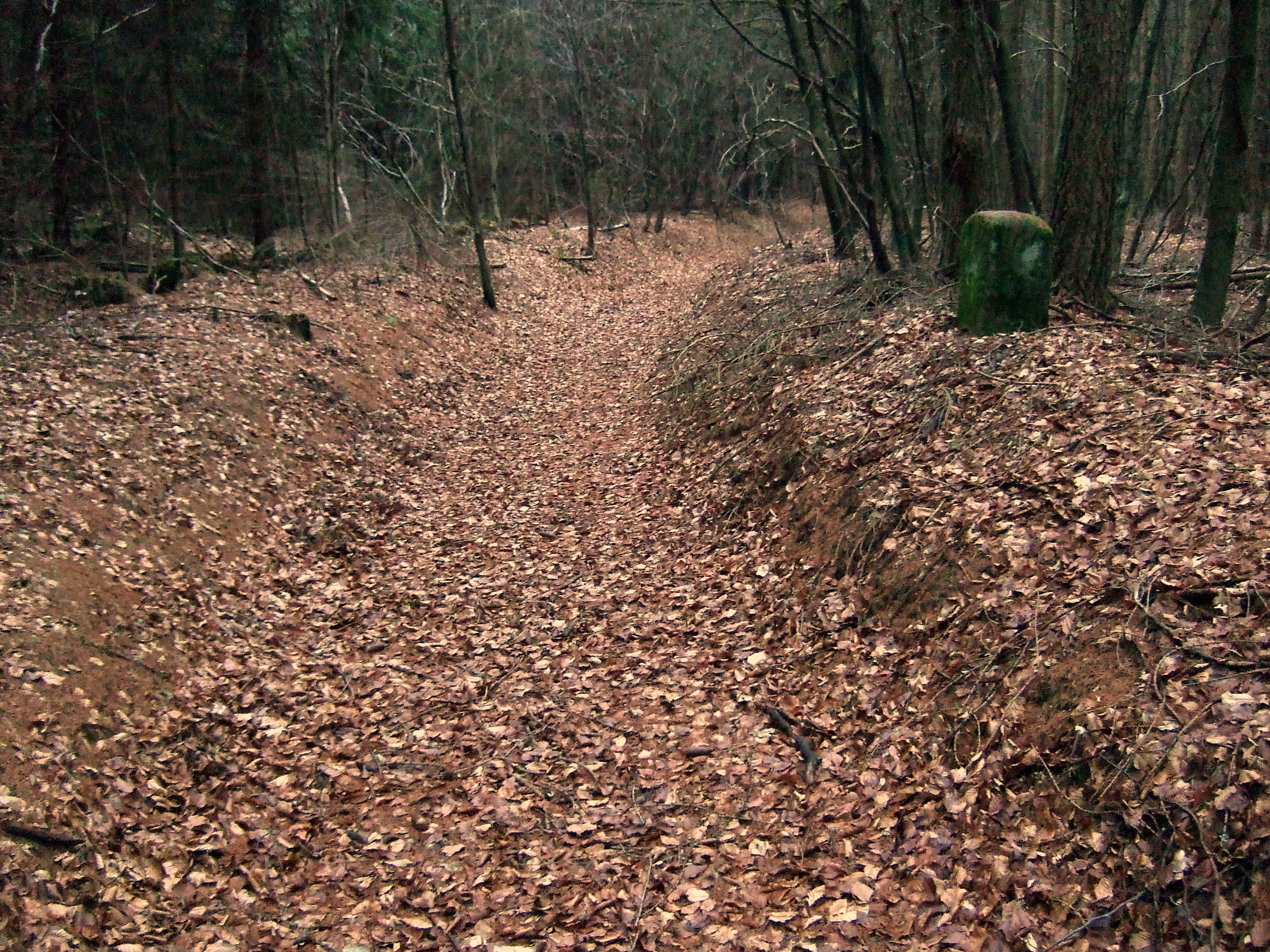 Überreste der Birkenhainer Landstrasse im Spessart in der Nähe der ehemaligen Zollstation und Herberge Bayerische Schanz. Typisch für Altstrassen ist hier ein Hohlweg zu sehen, der für Reiter und schmale Pferdewagen geeignet war. So wie auf diesem Bild darf man sich gut ausgebaute Fernreisewege des Mittelalters vorstellen.